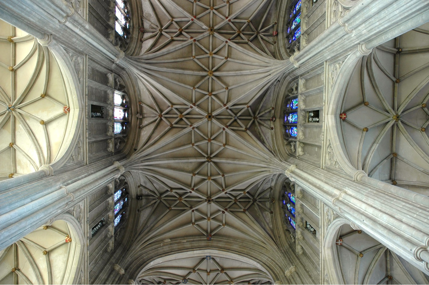 Sostre de la Catedral de Canterbury